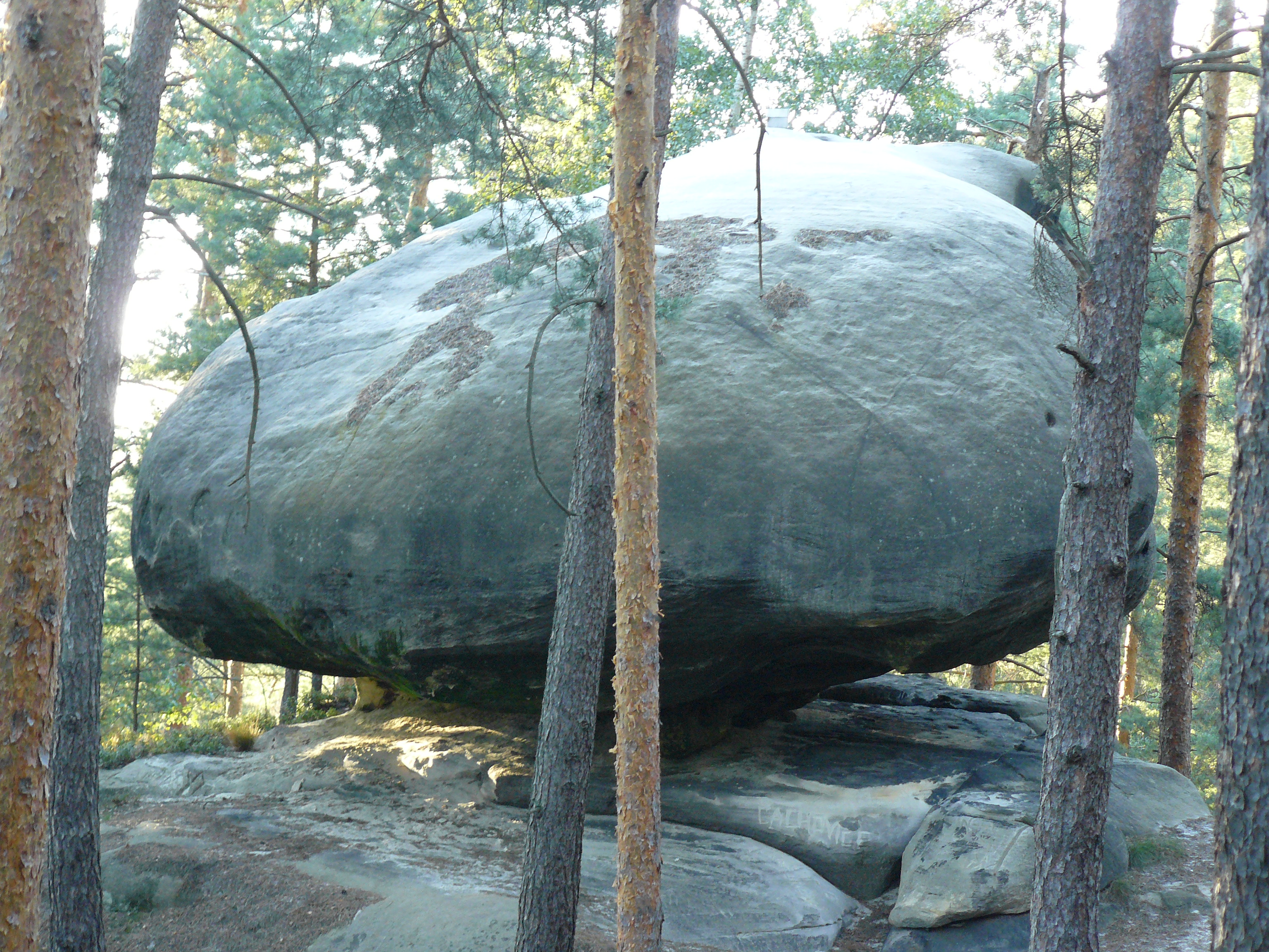 Skalní hřib, Drábovna